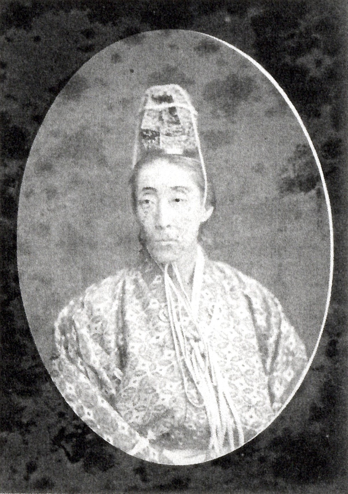 細川利永の肖像写真。